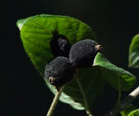 fruto de Guettarda uruguensis